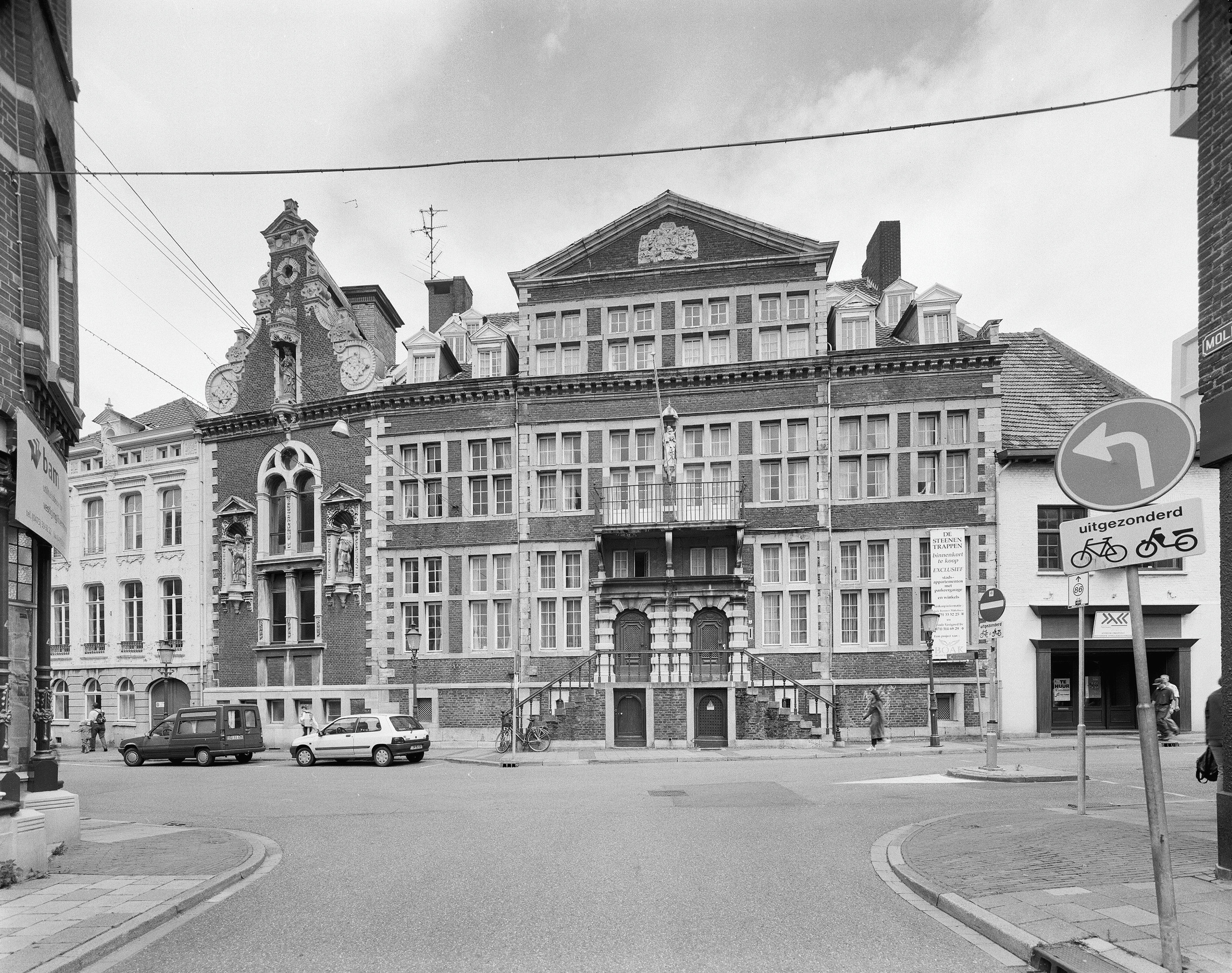 De Steenen Trappen: Overzicht voorgevel (opmerking: Gefotografeerd voor Monumenten In Nederland Limburg)